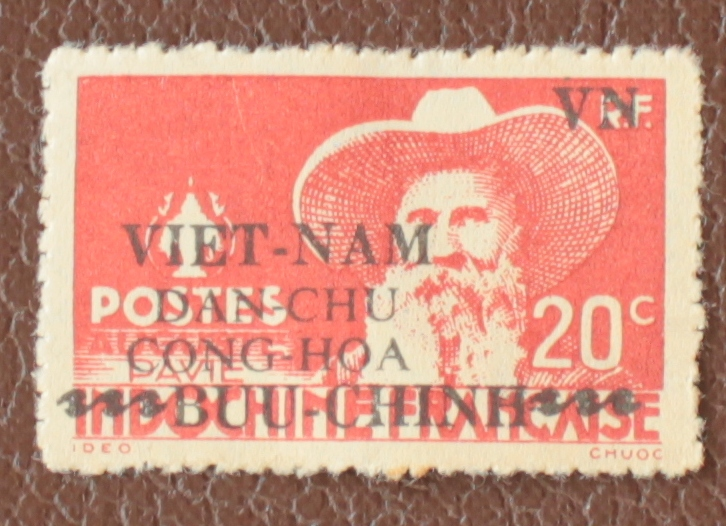 Марки Вьетнама